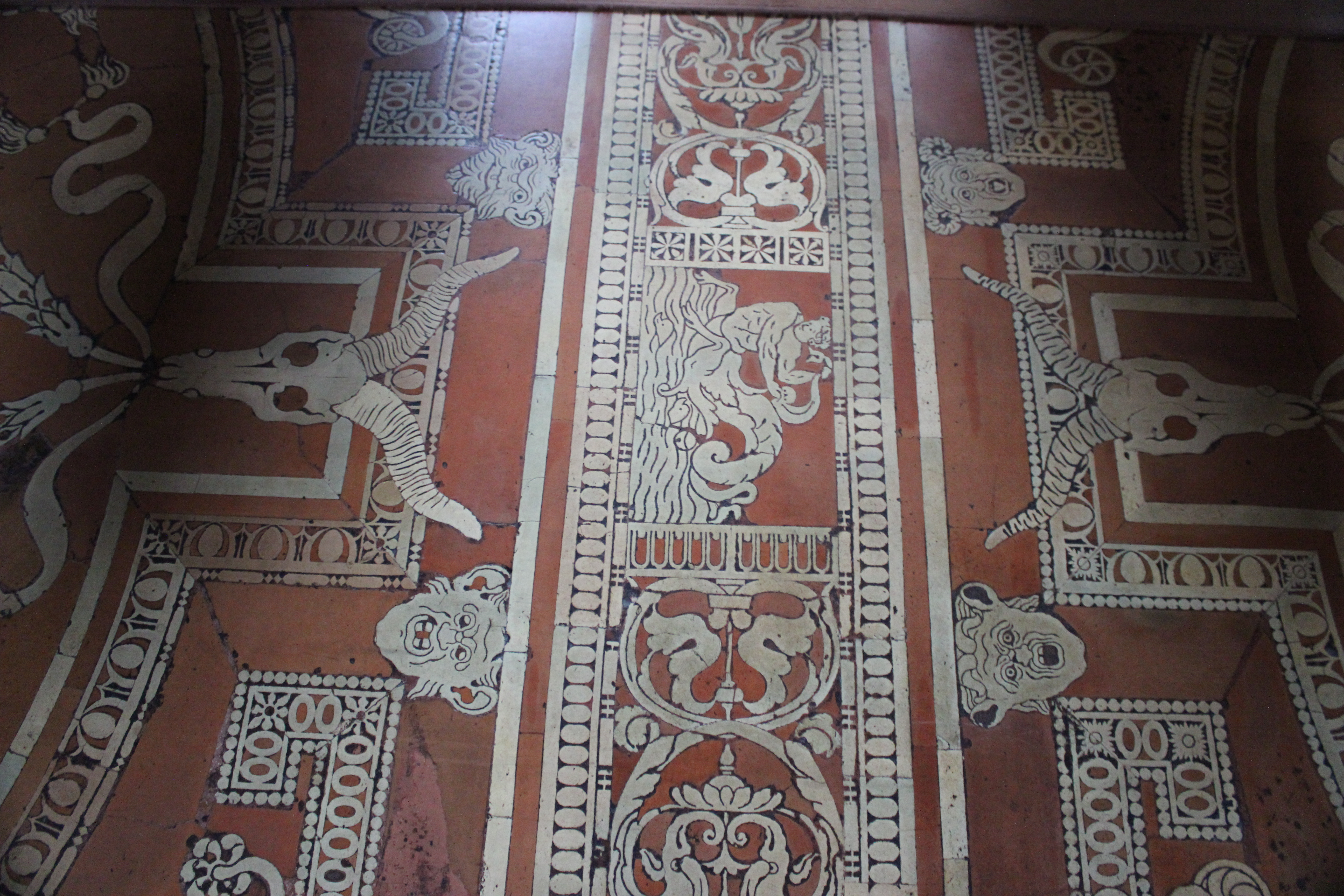 Pavimento de la Biblioteca Laurenziana.